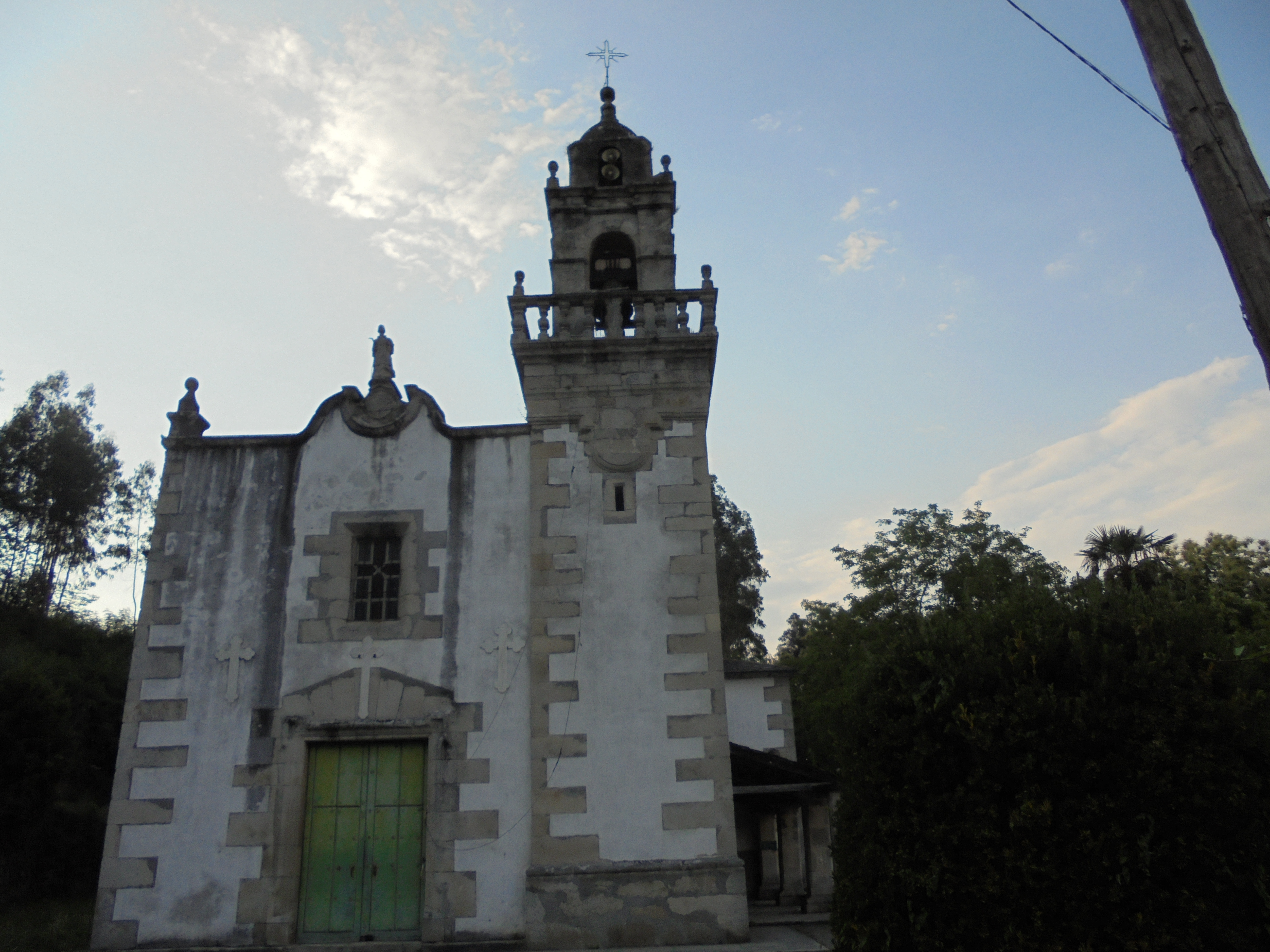 Igrexa parroquial de san Vicente de Lagoa ( Alfoz)